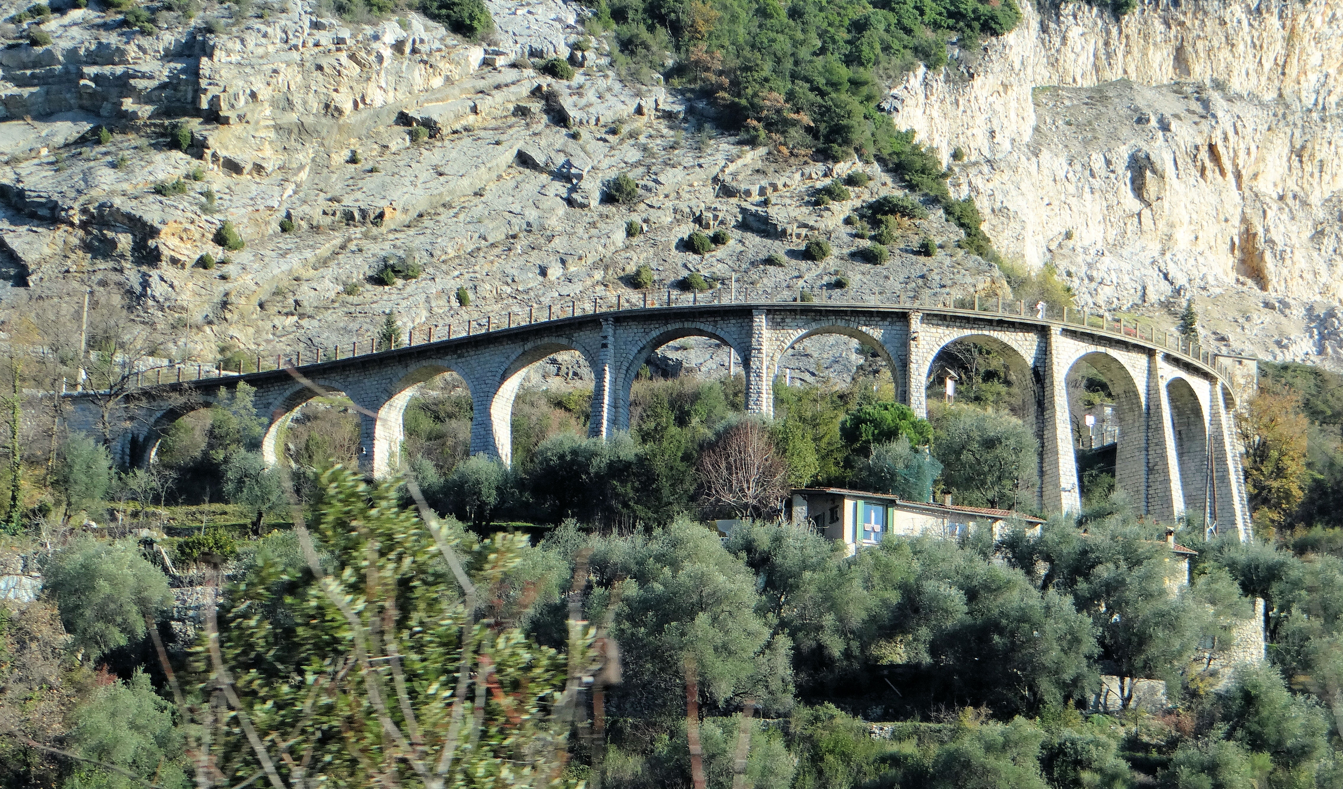 Tramway de Menton à Sospel - Viaduc du Caramel